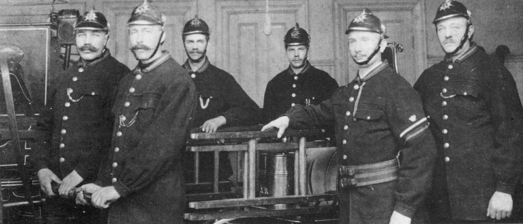 Personal på Värtans brandstation